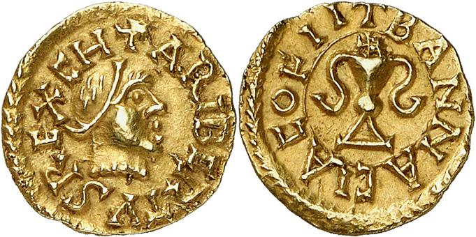 Triens frappé à Bannaciaco, Banassac (Lozère). Avers : CH+ARIBERTVS REX tête diadémée à droite. Couronne extérieure. Revers : +BANNACIACO FIIT calice à deux anses, surmonté d’une croisette. Couronne extérieure.